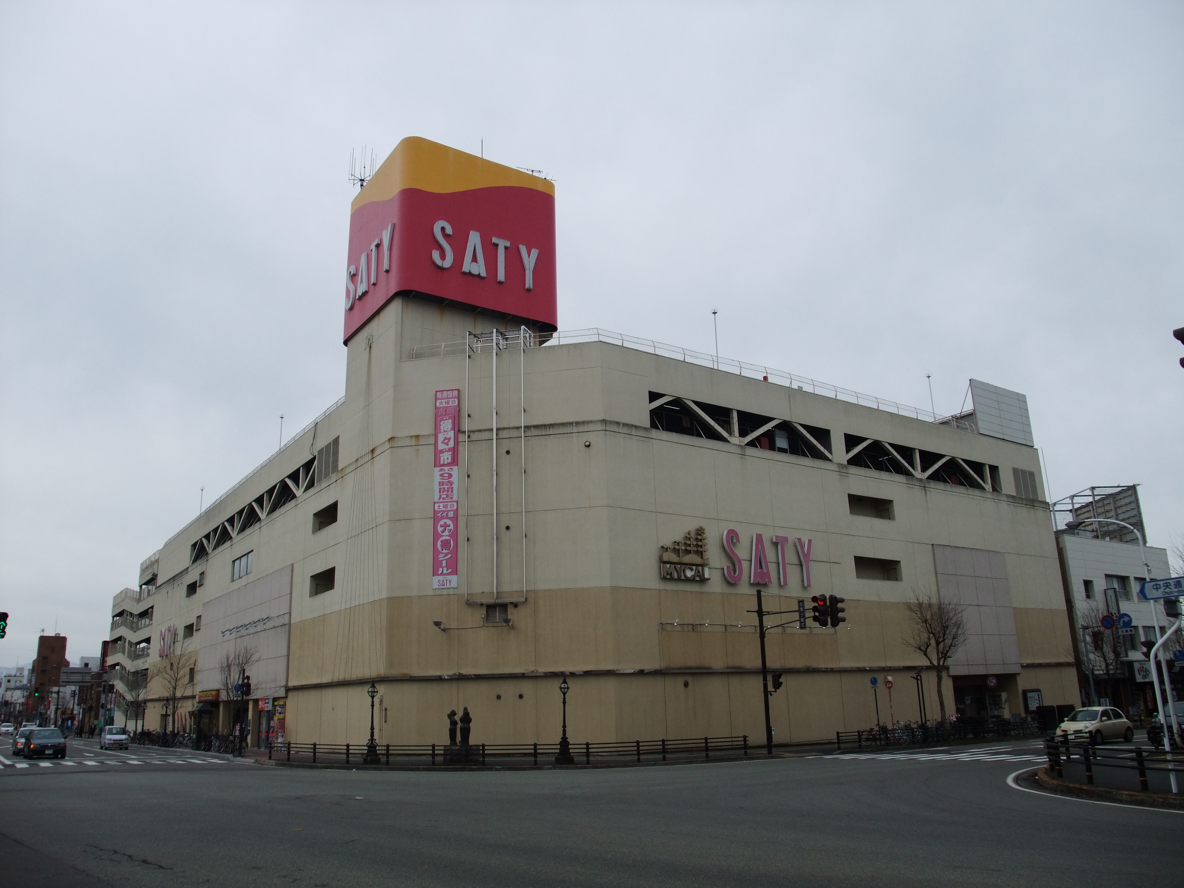 会津サティの外観